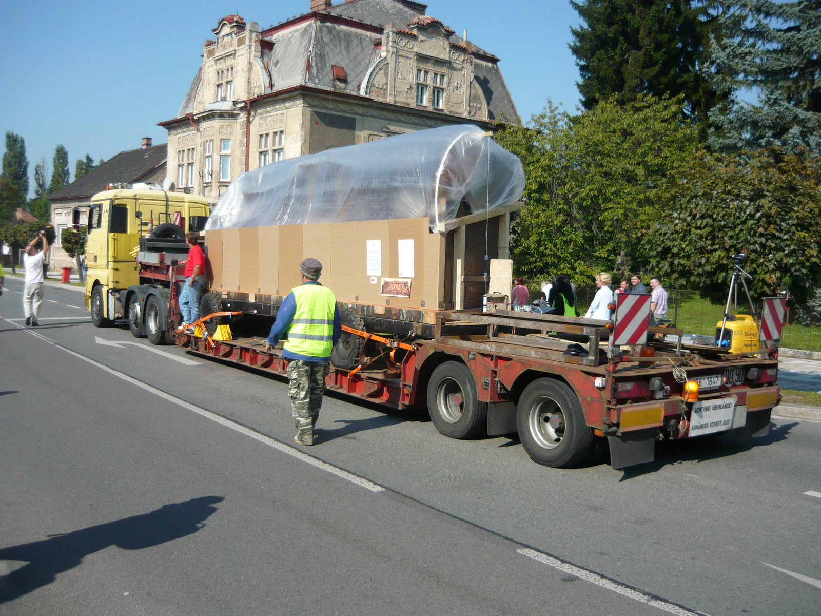 Třebechovice pod Orebem. Přeprava Třebechovického betlému do náhradních prostor.